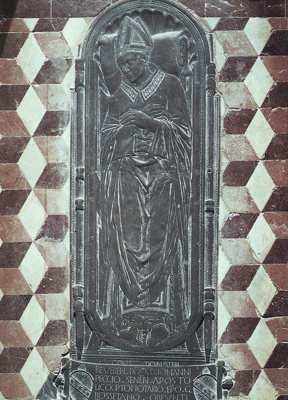 Donatello, lastra tombale di giovanni pecci, 1426 circa, siena